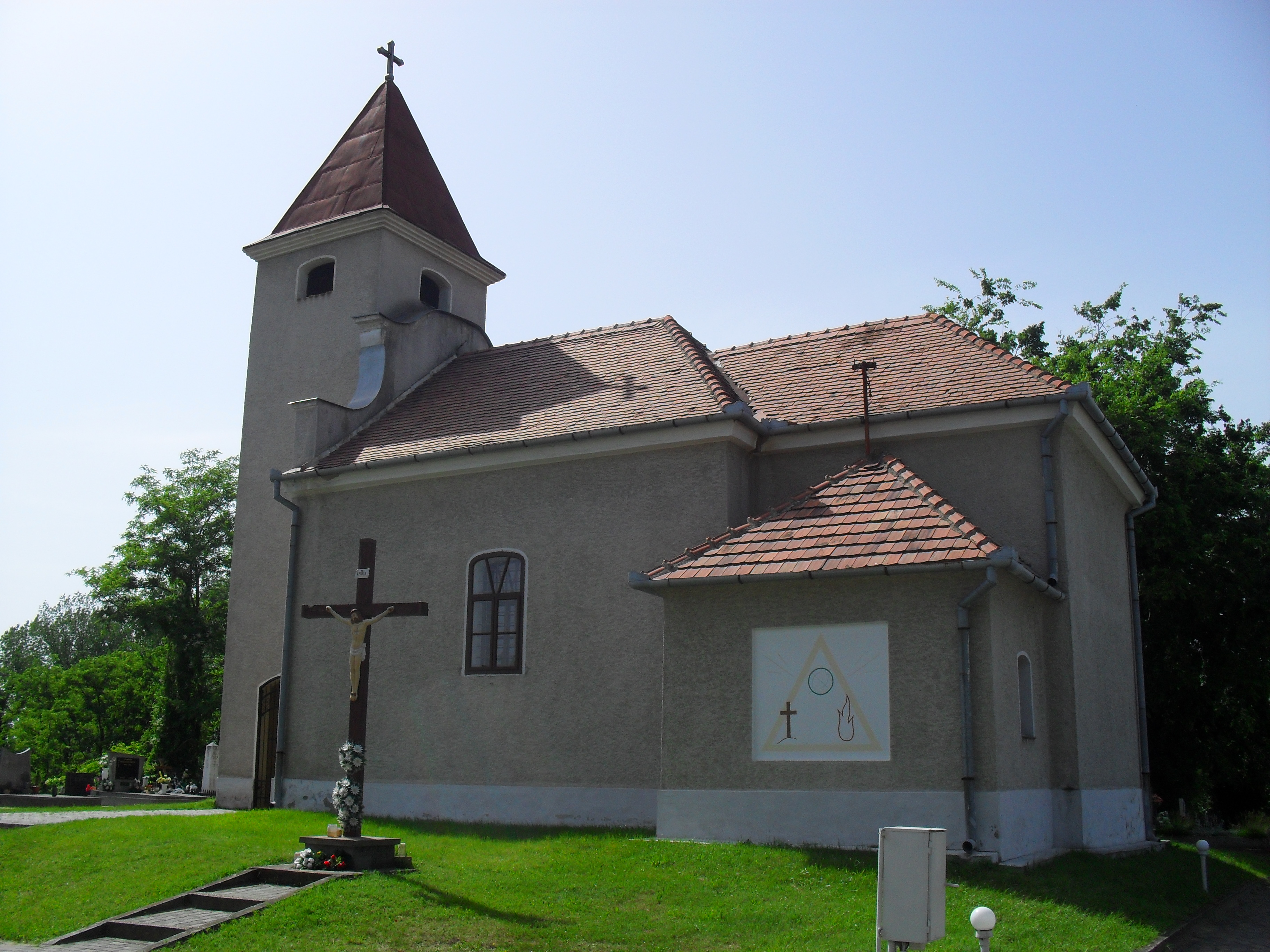 Virt - katolikus templom